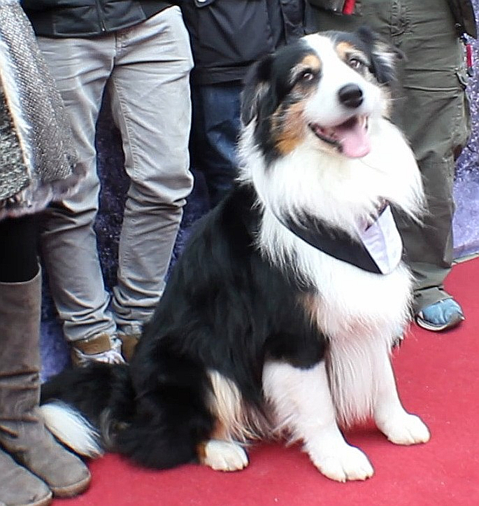 Fünf Freunde (2012) Kinofilm - Schleswigpremiere -- Der Hund Coffey (Excellent Choice Count Down, Wurftag 15.04.2005) zu Füßen der Darsteller und des Regisseurs bei der Schleswigpremiere